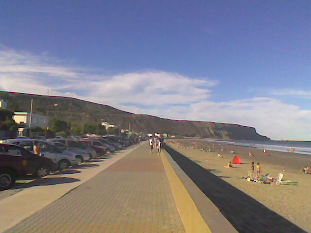 VISTA DE LA RAMBLA CHOCANDOCON PUNTA PIEDRAS